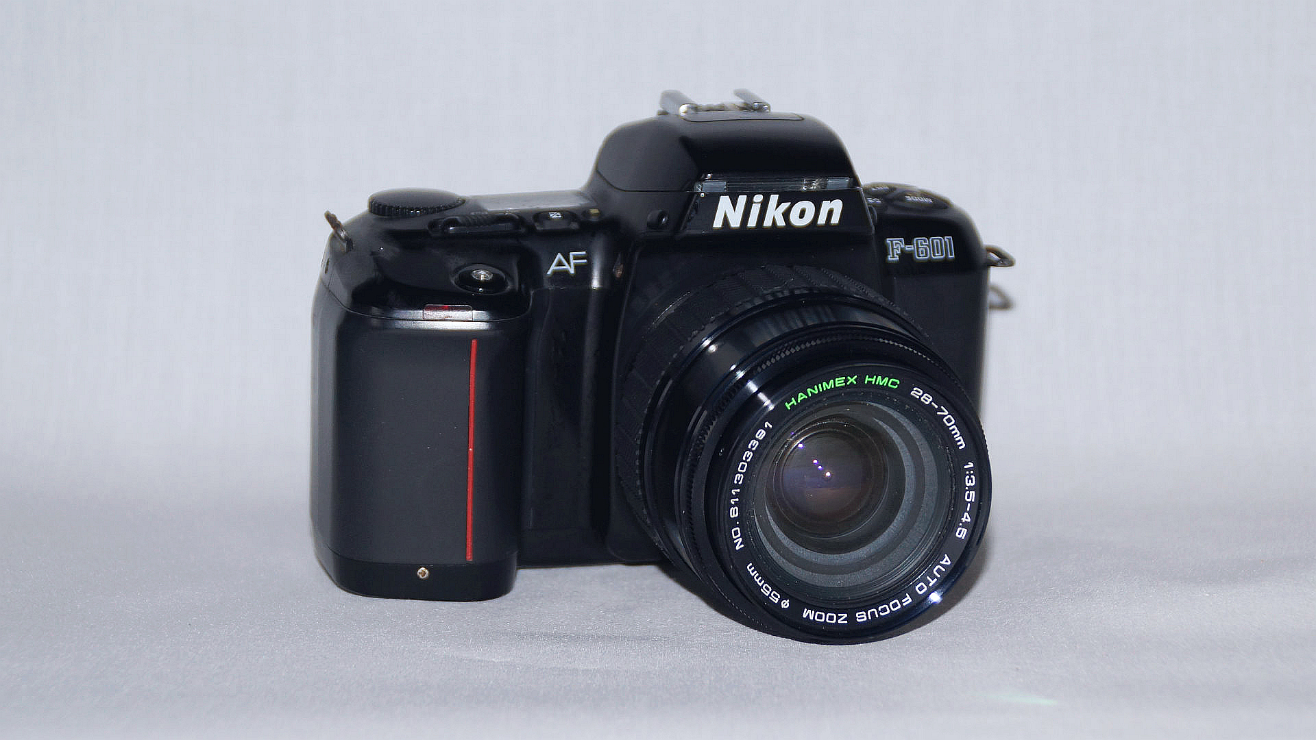 Nikon F-601 mit AF Zoom 28-70 mm, 1:3.5-4.5 - Foto Wolfgang Pehlemann DSC04841